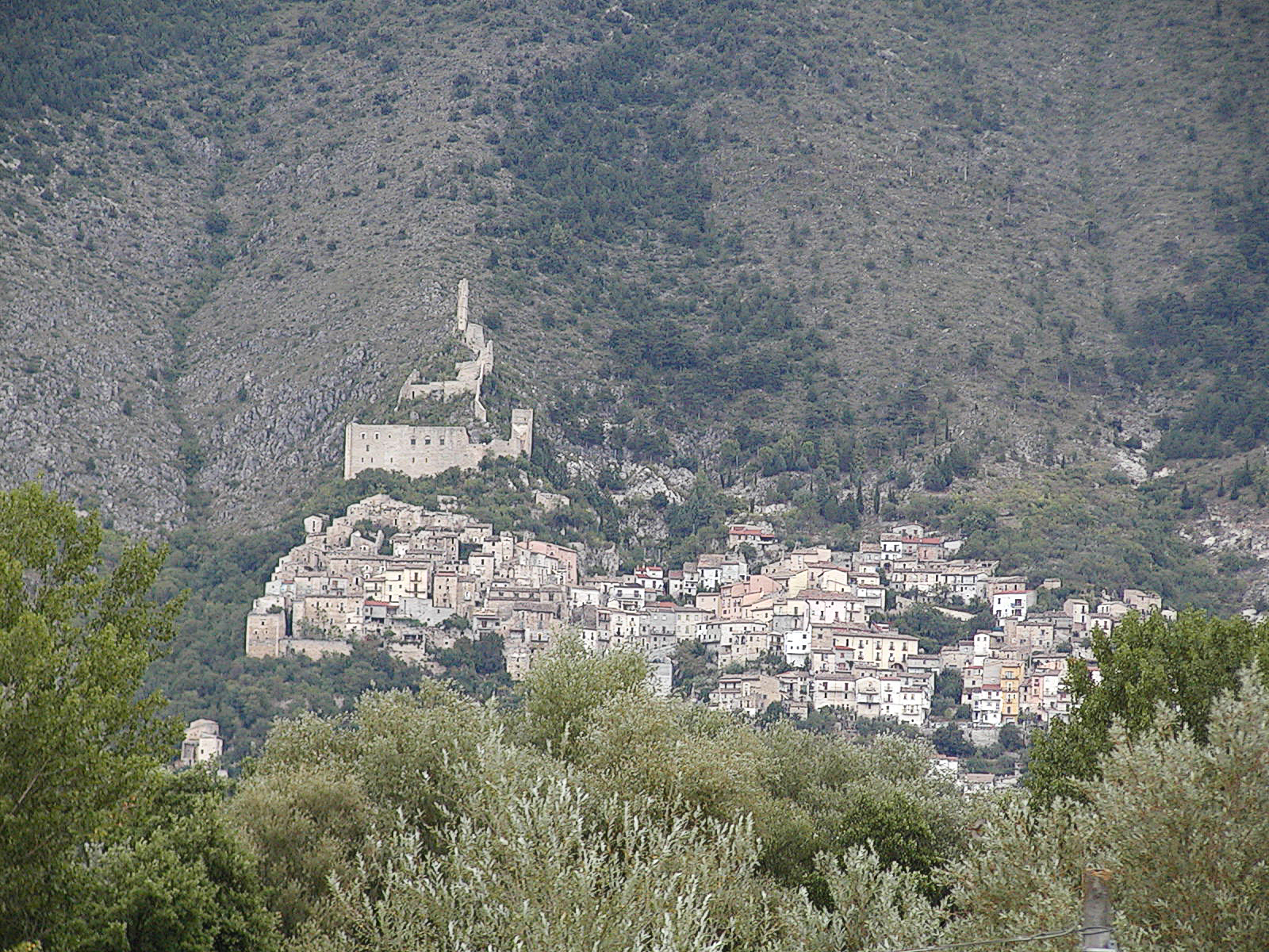 Il castello di Roccacasale